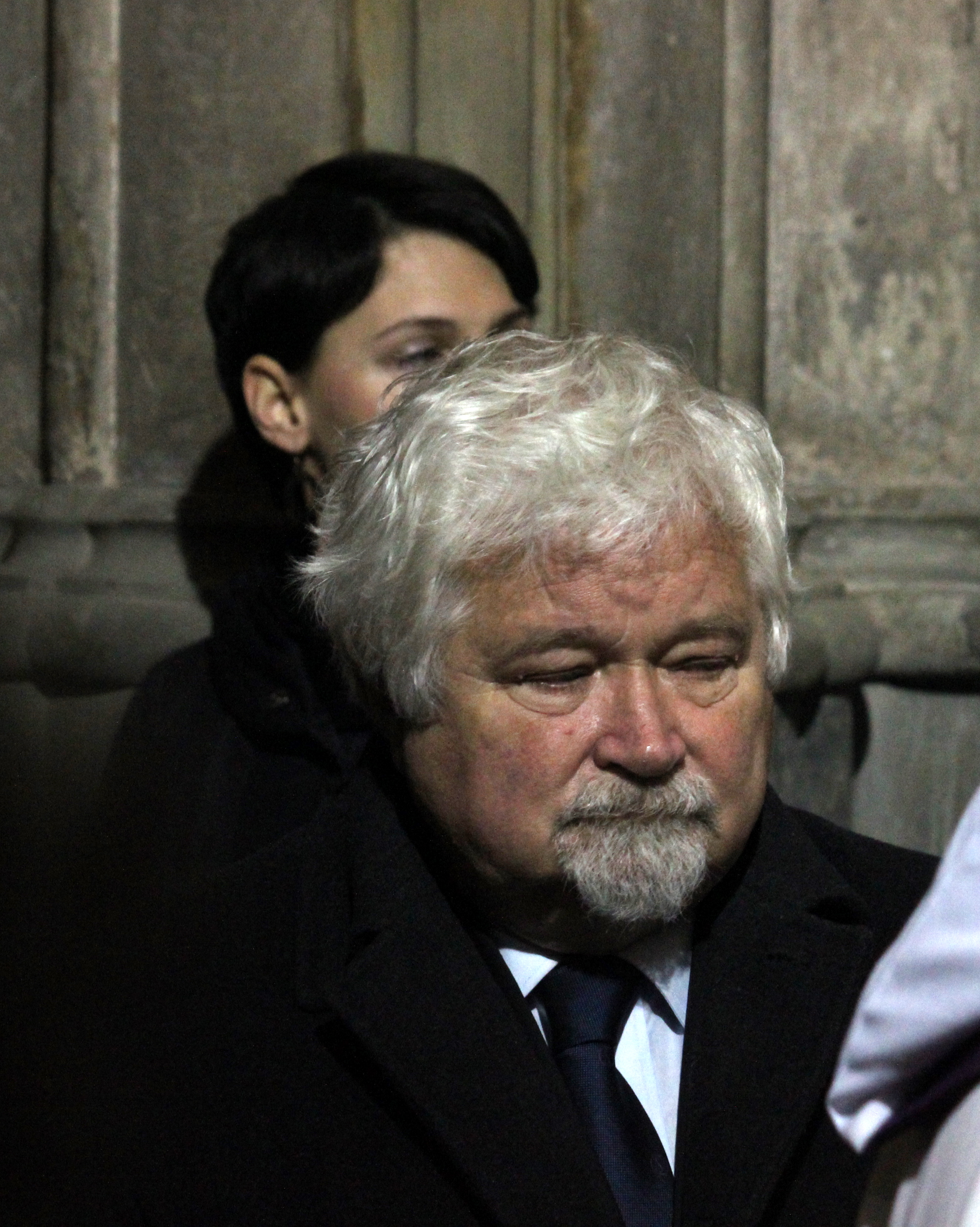 Státní pohřeb Václava Havla, posledního československého a prvního českého prezidenta, proběhl v pátek 23. prosince 2011 od 12.00 hod v katedrále svatého Víta, Václava a Vojtěcha na Pražském hradu. Zúčastnila se jej manželka Dagmar Havlová s dalšími rodinnými příslušníky, nejvyšší čeští ústavní činitelé v čele s prezidentem republiky Václavem Klausem, politici, diplomaté a řada významných hostů z České republiky i zahraničí. This photograph was taken with a DSLR from WMCZ's Camera grant.